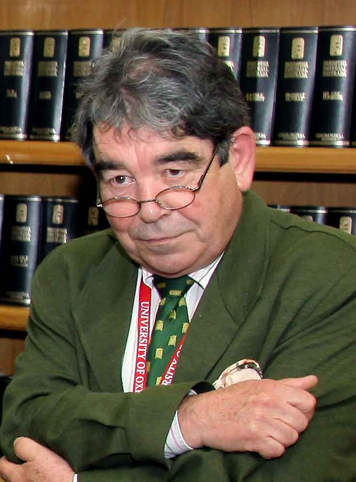 Tom Burns en una reunión de Esperanza Aguirre con laFundación Areces.